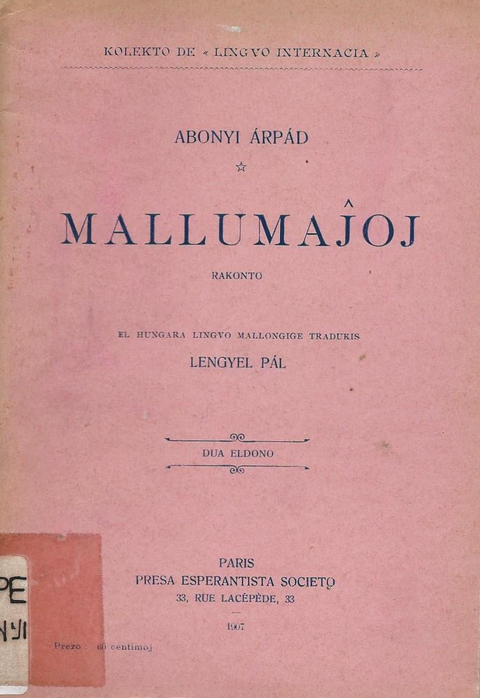 librokovrilo de libro "Mallumaĵoj", 1907